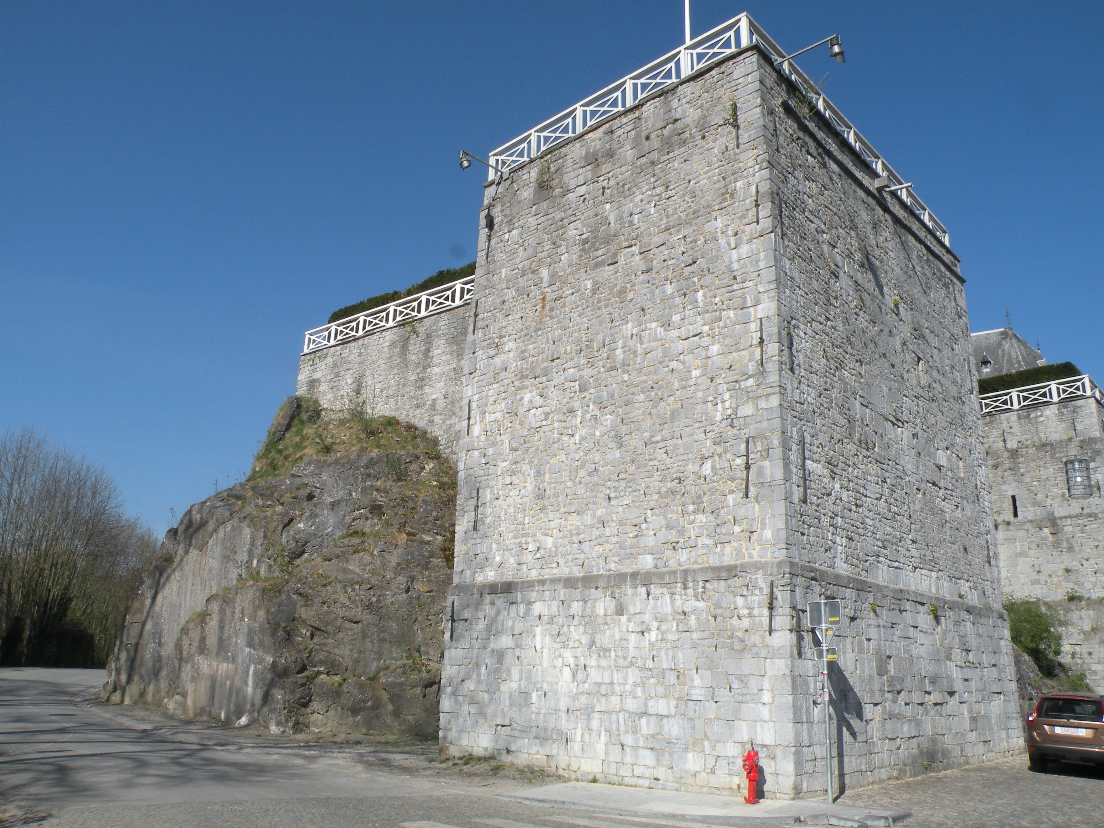 exterieur du chateau de Chimay